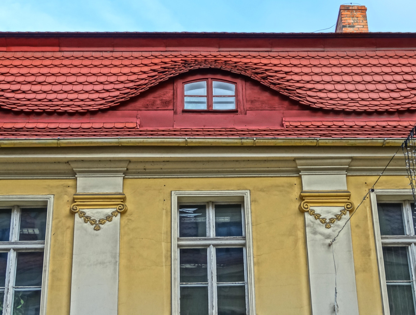 Kamienica ul. Długa 41 w Bydgoszczy (1798)